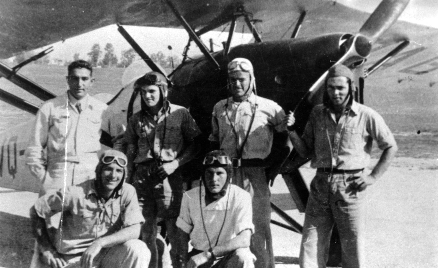 טייסי הפלמ"ח 1 - קורס מס' 1 - קורס הטייס המוטורי הראשון של מח' הטייס בפלמ"ח. עומדים מימין משה פלדמן, מנחם ברנשטיין, פרץ גרוסר, צבי מנט (מכונאי),כורעים מימין: ששון נוביק, יעקב בן חיים